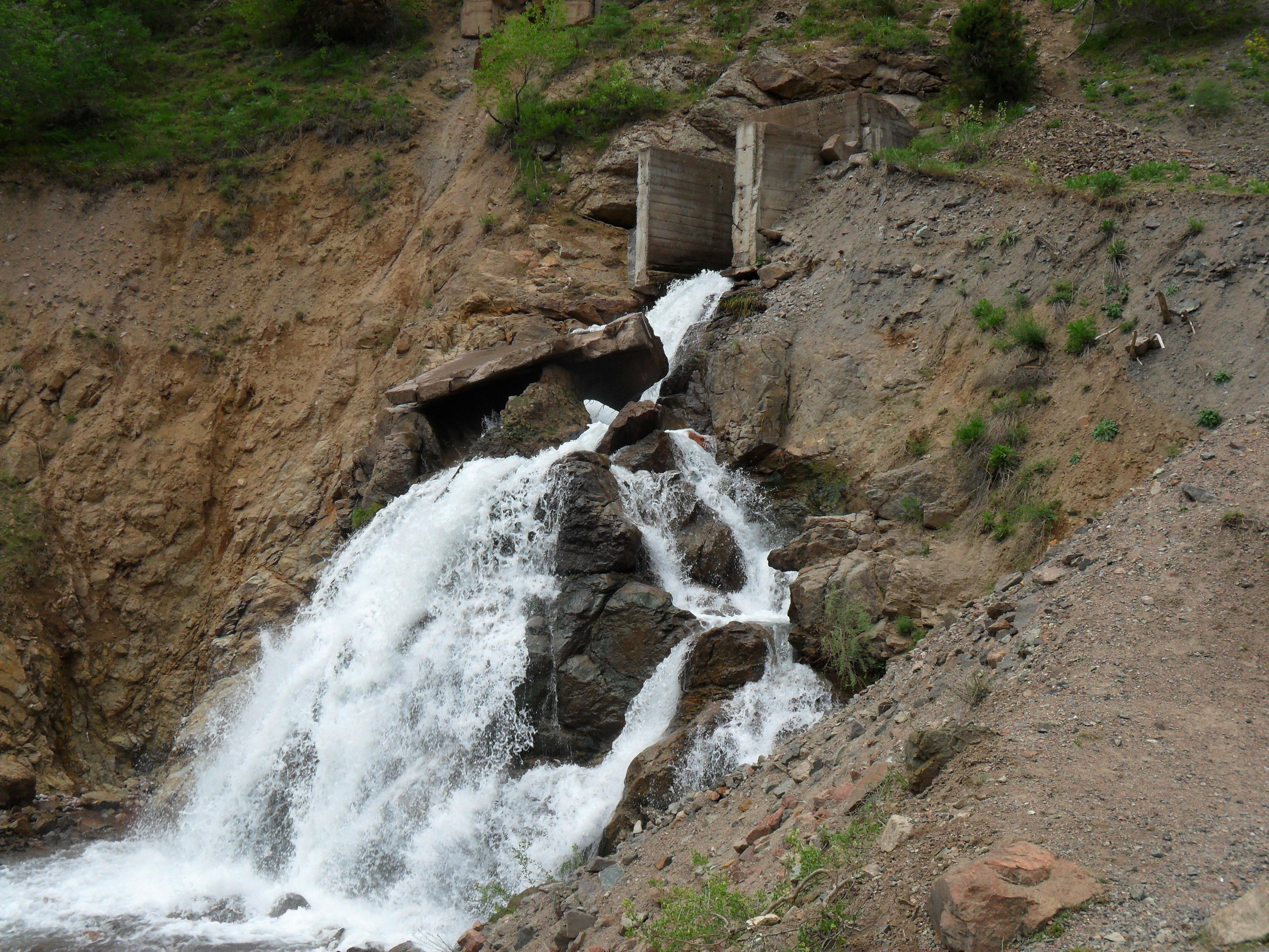 Водосброс на реке Алатаньга. Ташкентская область, Республика Узбекистан